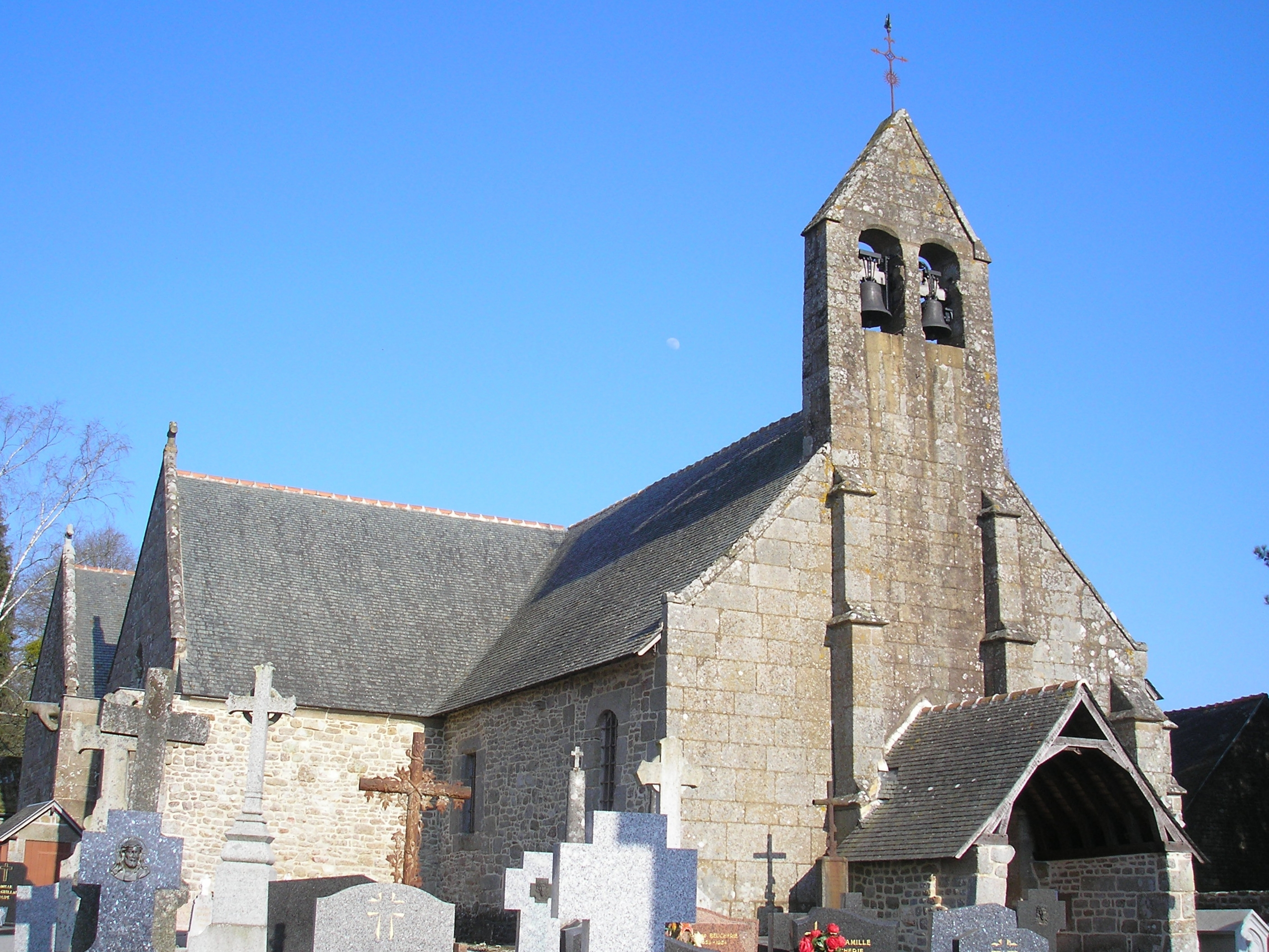 Villamée (Bretagne, France). L'église Saint-Martin.